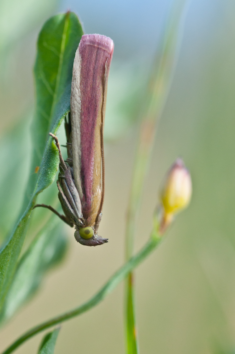 Papillon pris dans un champ en Poitou-Charentes en plein mois d'aout. A priori espèce Oncocera semirubella.